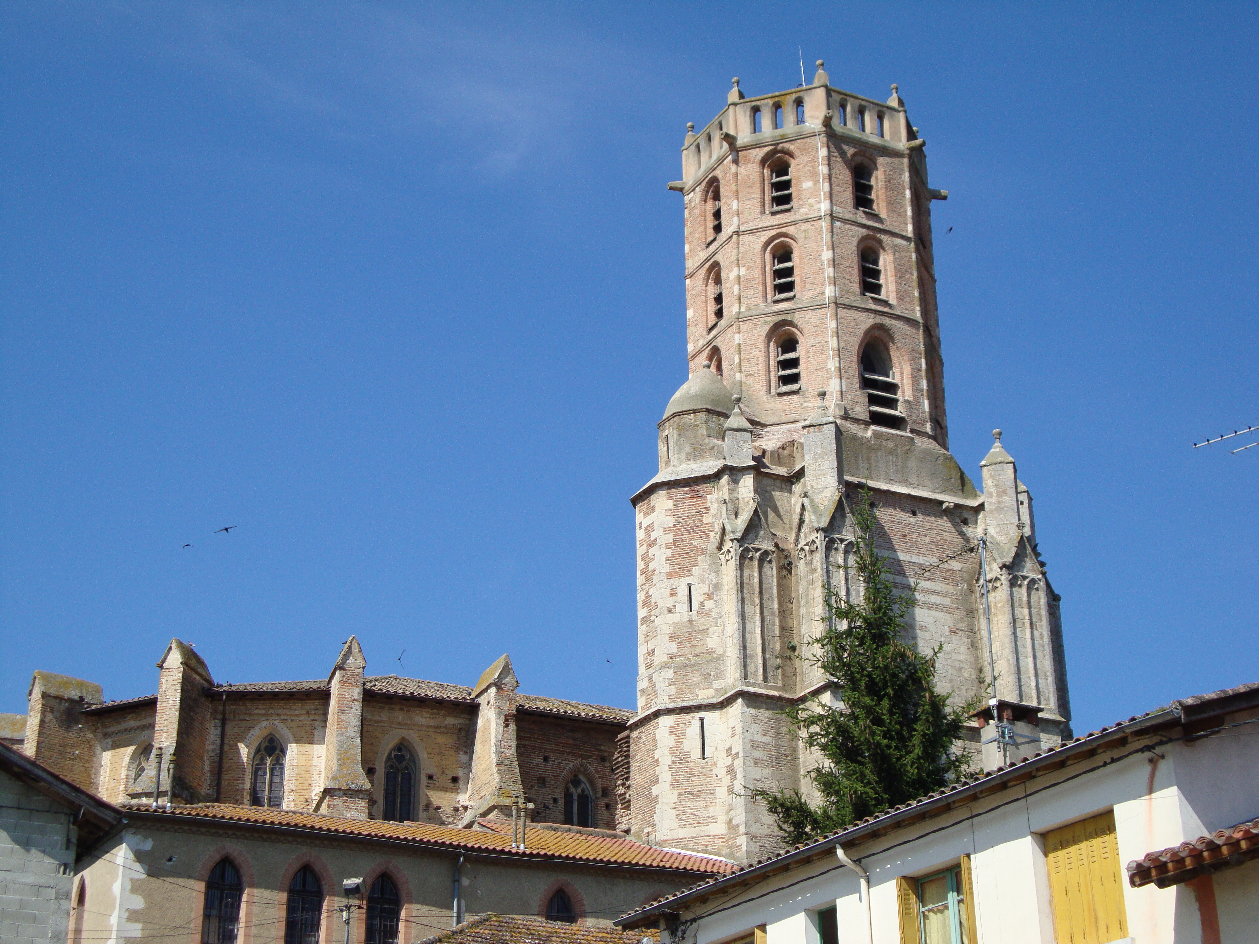 Gimont (Gers, Fr) église, sa tour